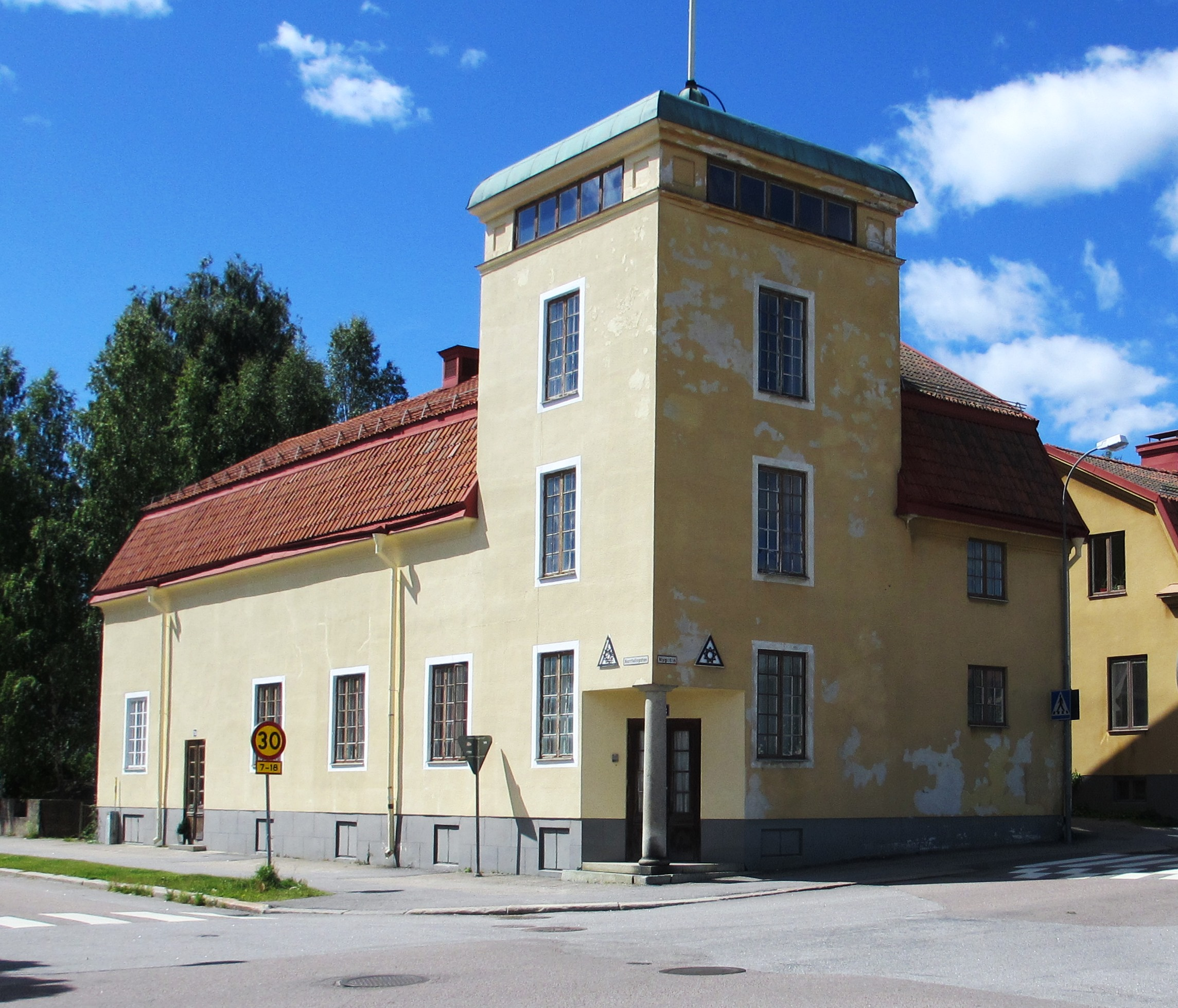 Ordenshuset Valkyrian i Söderhamn